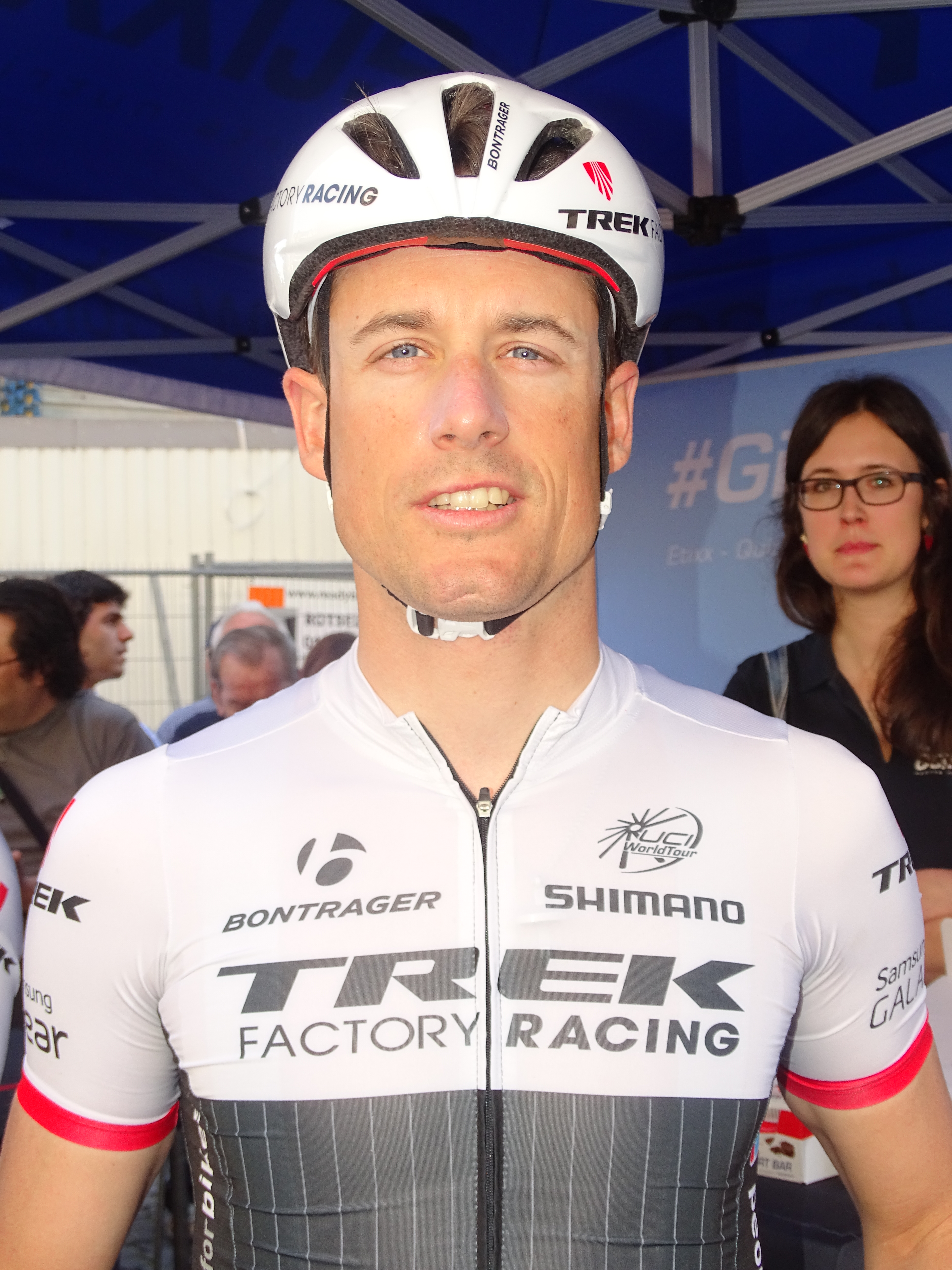 Reportage réalisé le mercredi 15 avril à l'occasion du départ de la Flèche brabançonne 2015 à Louvain, Belgique.